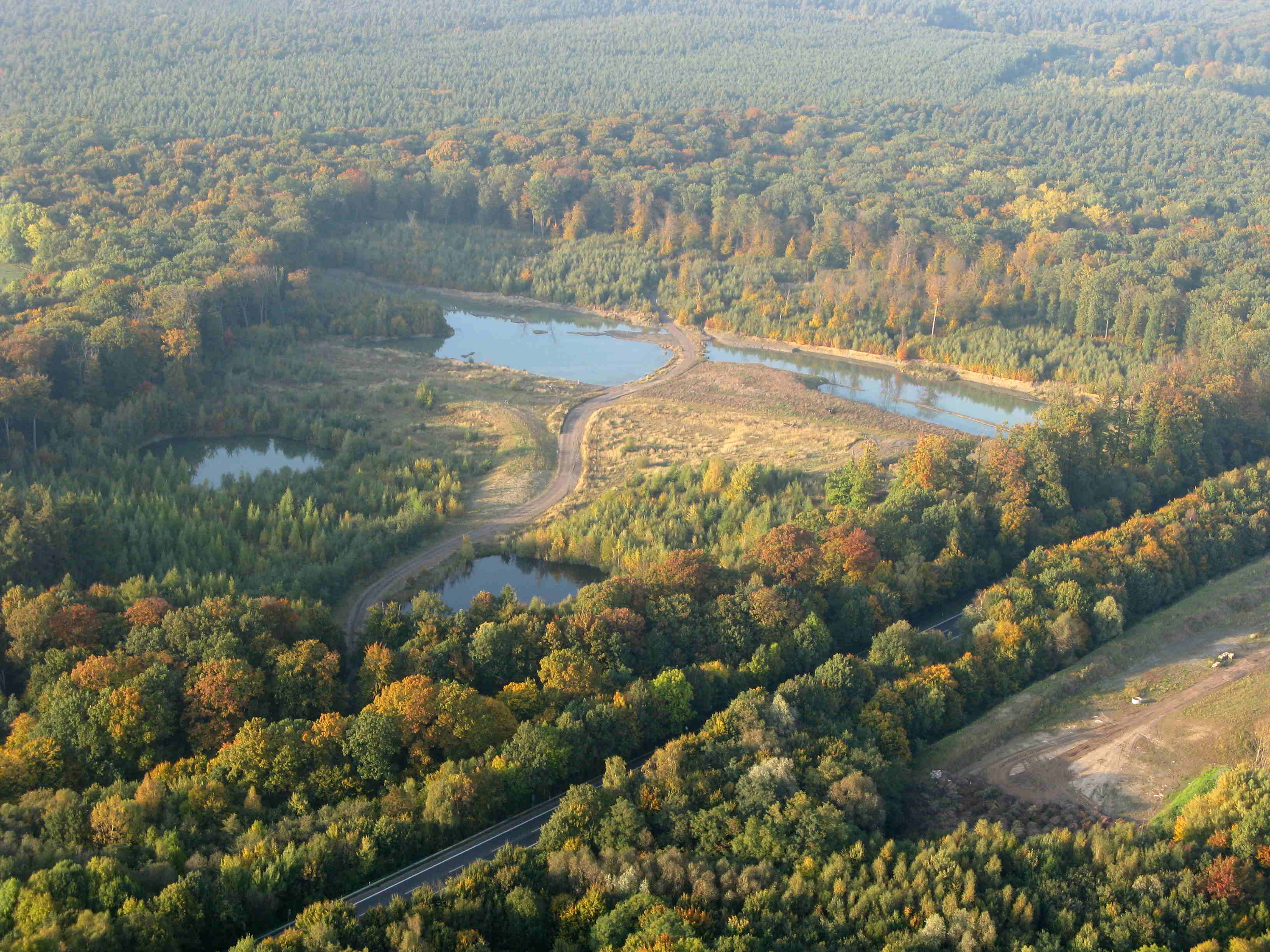 Luftaufnahme des Naturschutzgebietes Kohbrink zwischen Minden und Petershagen in Nordrhein-Westfalen. Im Bildvordergrund die Bundesstraße 61. Im Hintergrund das Waldgebiet und Naturschutzgebiet Heisterholz.